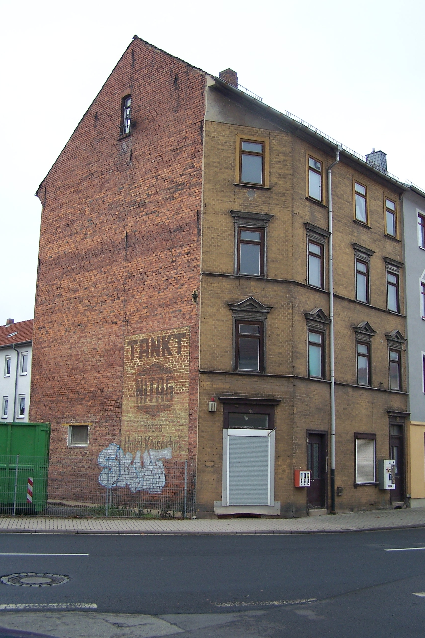 Das gründerzeitliche Eckhaus Altstadtstraße 60 befindet sich am östlichen Ende dieser Straße, zwischen den Einmündungen der Weimarischen Straße und der Ostendstraße. Das Haus wurde vom Bauunternehmer Johannes Keutterling im Jahr 1905 entworfen und erbaut.